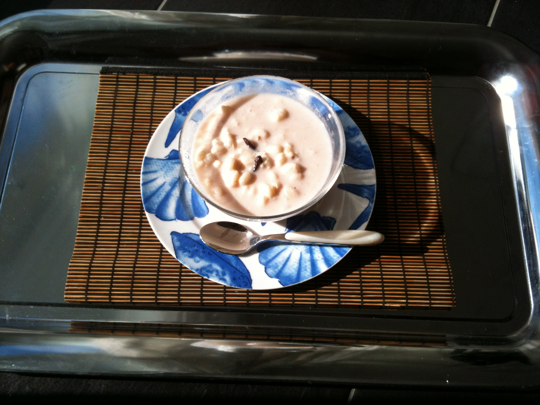 Manguzá serviço em restaurante.